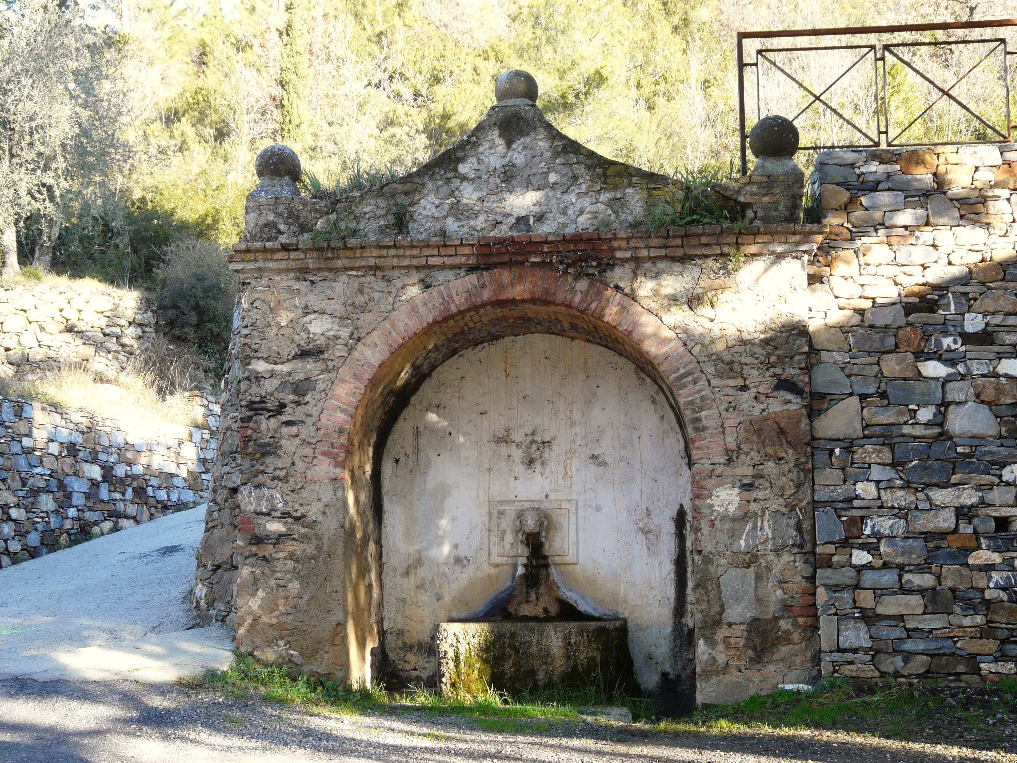 Fontana presso la Chiesa della Natività, Garlenda, Liguria, Italia